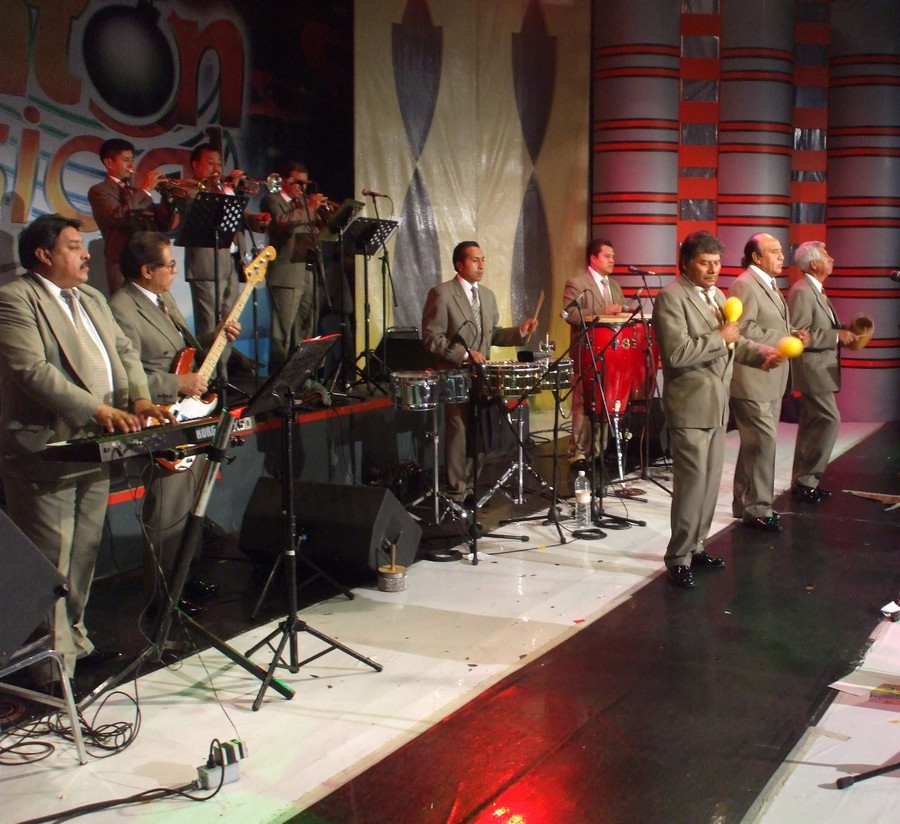 foto tomada con mi camara fotografica a la sonora siguaray en el granforum en el reventon musical